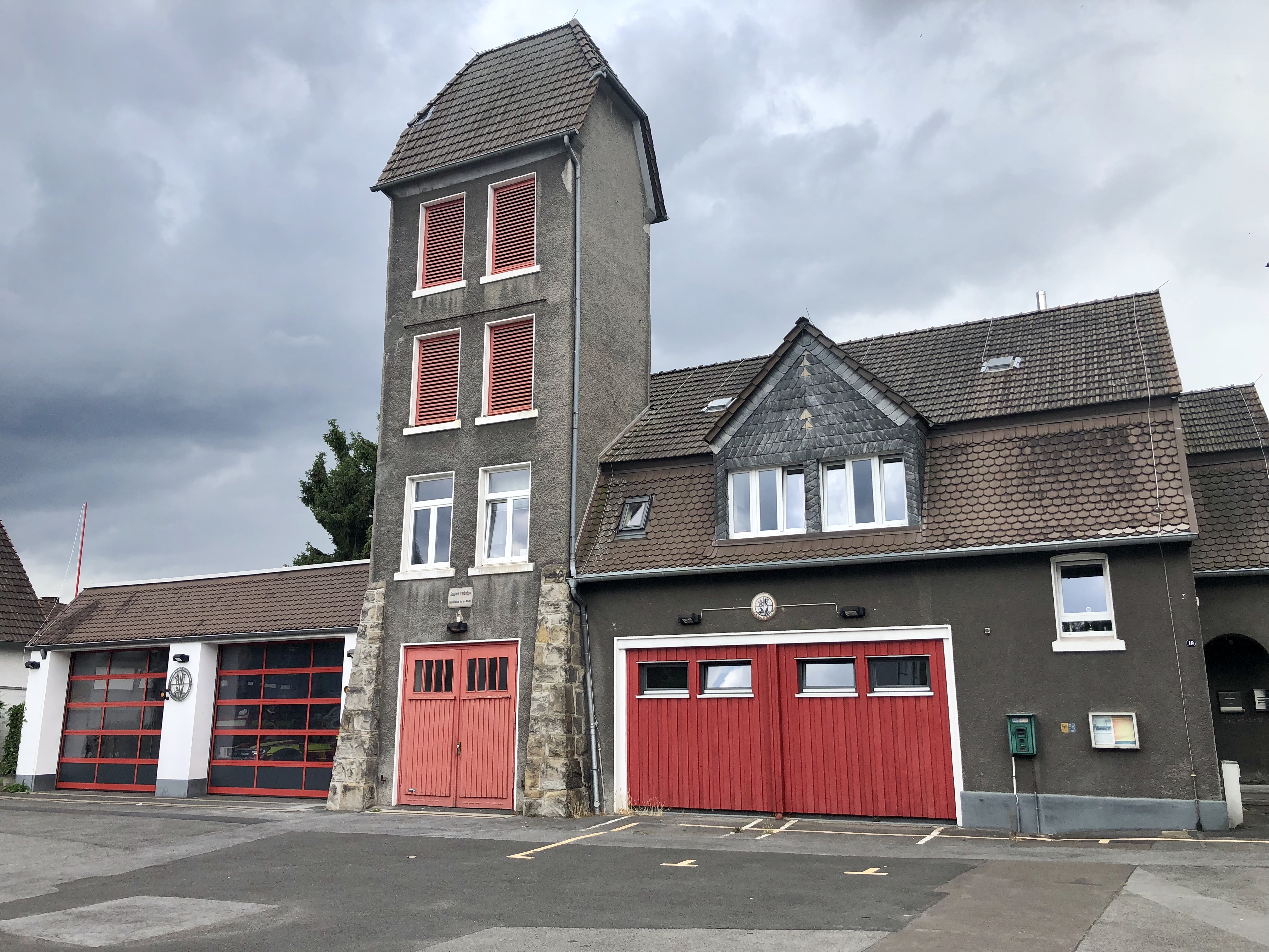 Gerätehaus des Löschzugs 16 der Feuerwehr Dortmund im Stadtteil Hombruch